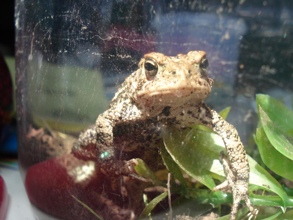 crapaud